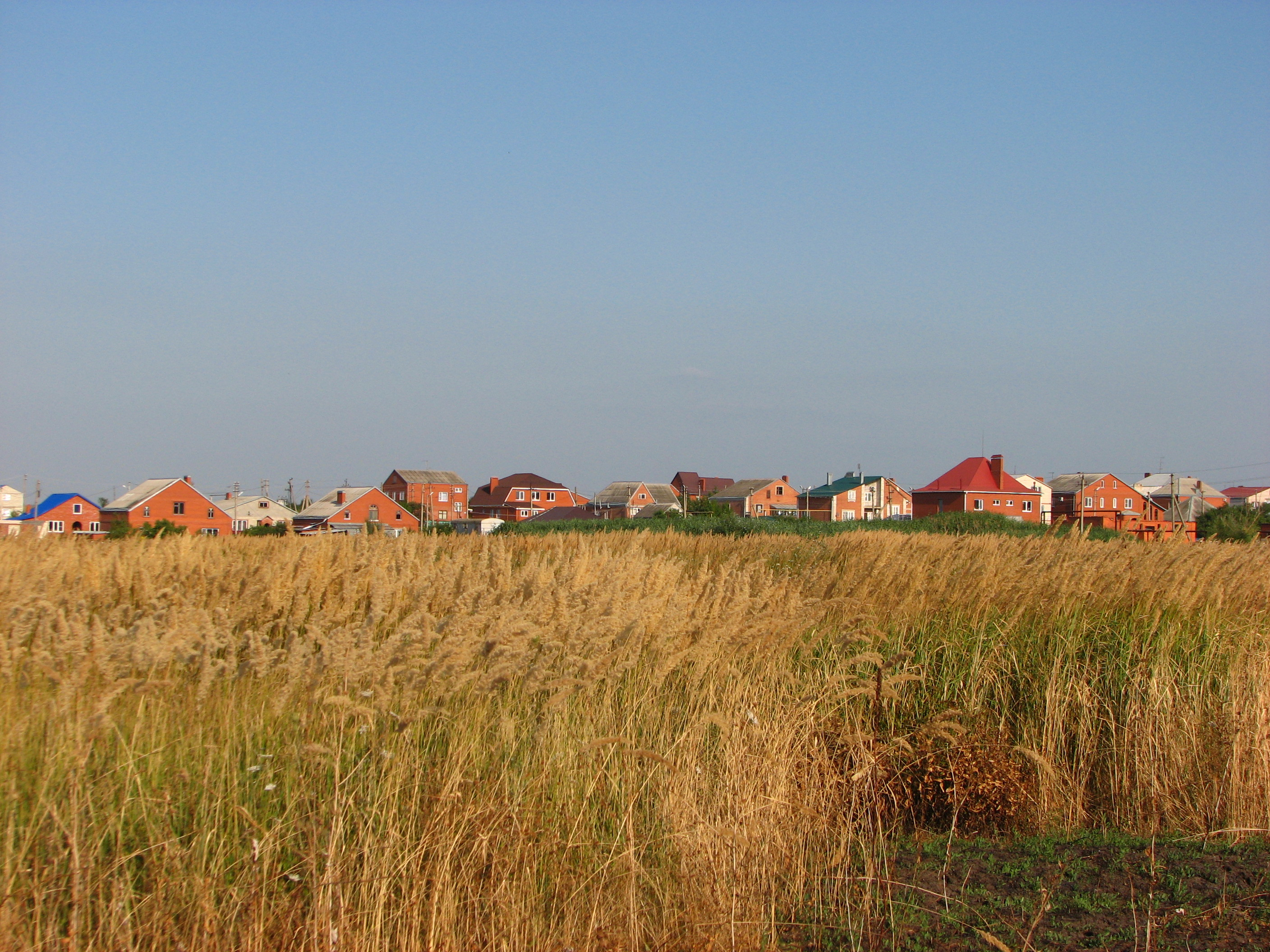 Вид на поселок Солнечный